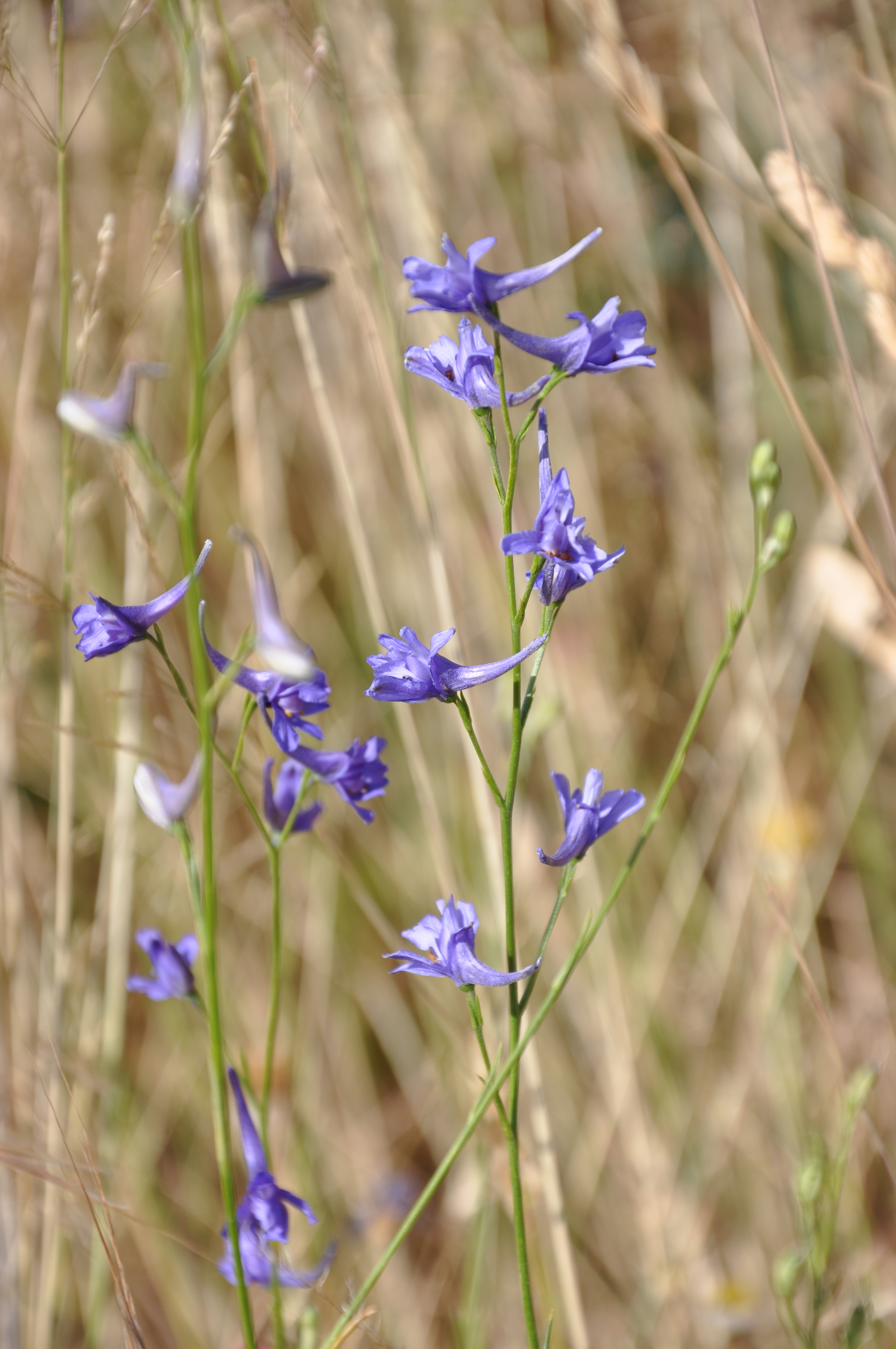 Espuela de caballero (Delphinium gracile) La Torre, Ávila, España.